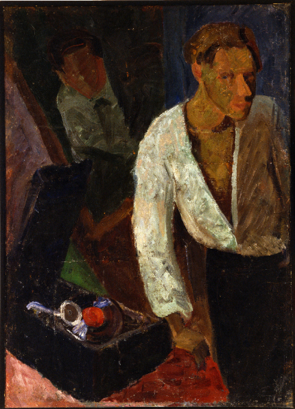 Self-portrait